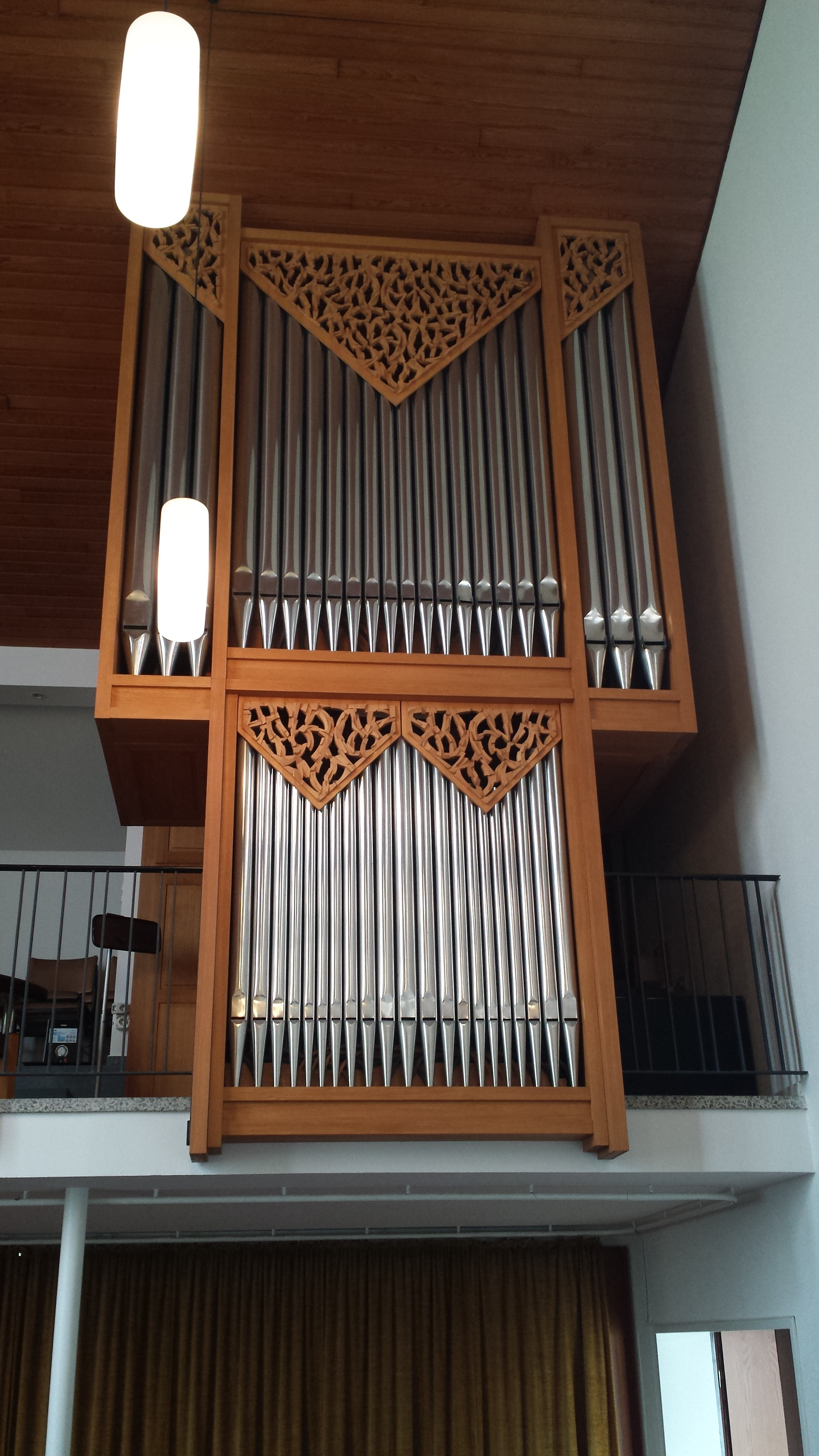 Prospekt der Orgel in der Versöhnungskirche Aachen. Sichtbar sind das Hauptwerk und das Unterwerk.